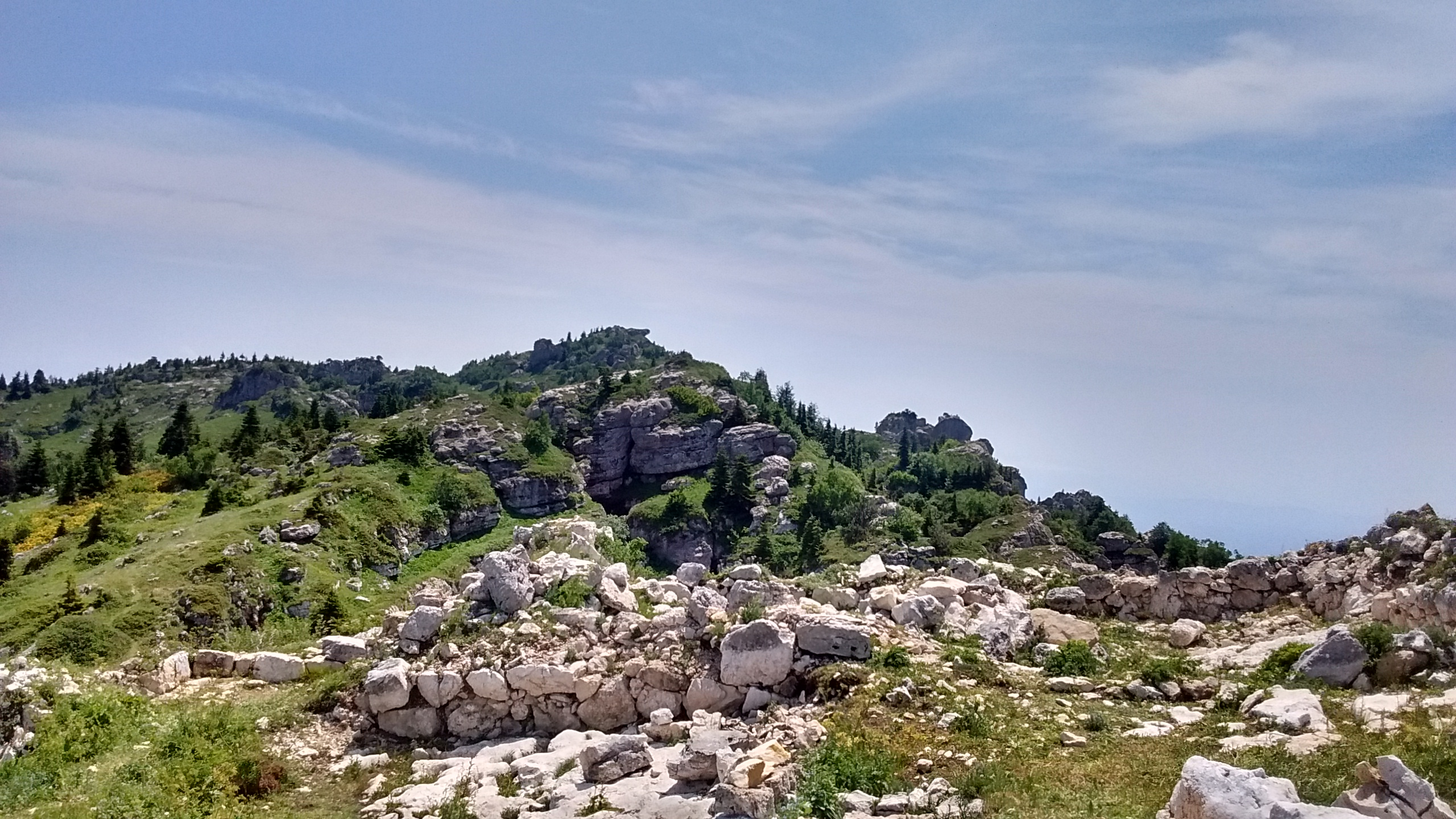 ზღვის დონიდან დაახლოებით 2200 მ-ზე მდებარე ხვამლის წმ. გიორგის ეკლესიის სამხრეთით მდებარე კლდოვანი ფერდობი დაფარული თეთრი ქვით, ბალახითა და შერეული ტყის საფარით.